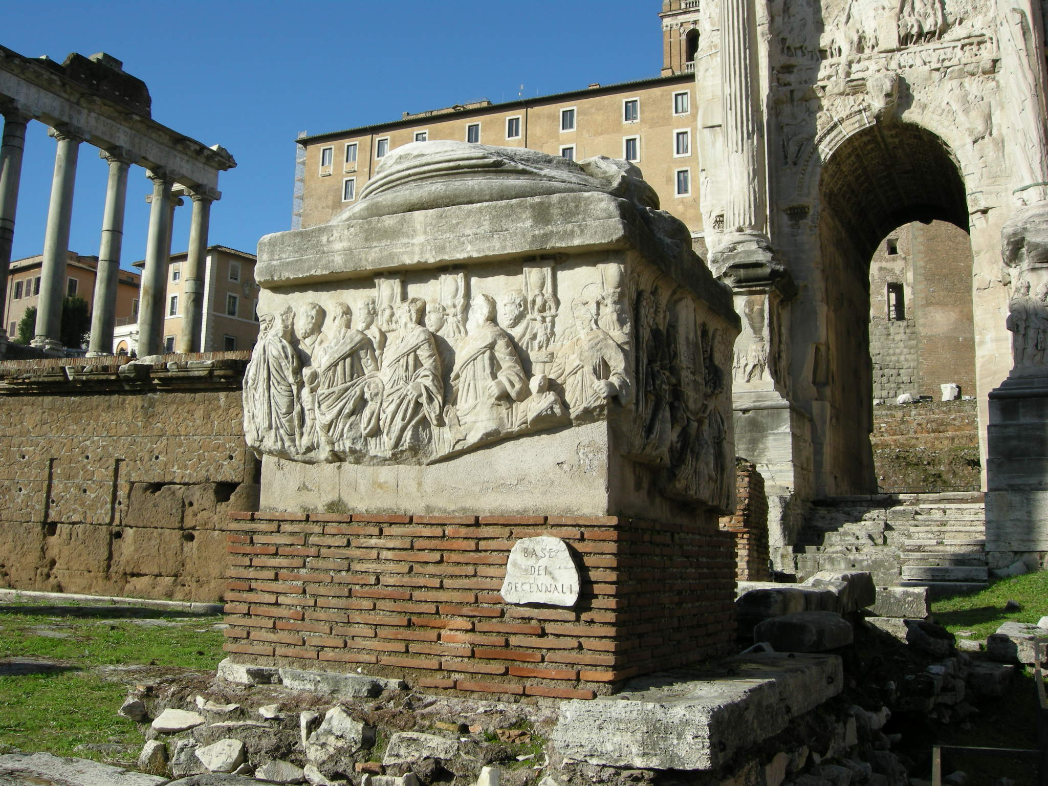 Base dei decennalia 01